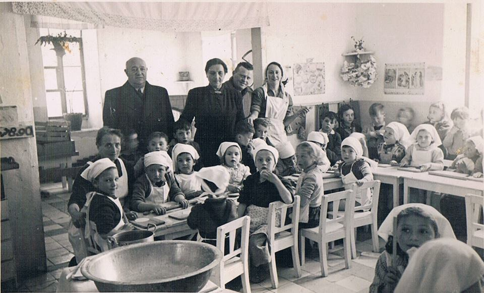 "גן סוקניק", שכונת "זיכרון משה" בירושלים, לקראת חג הפסח 1949. בתמונה: הגננת חסיה פיינסוד-סוקניק וילדי הגן.